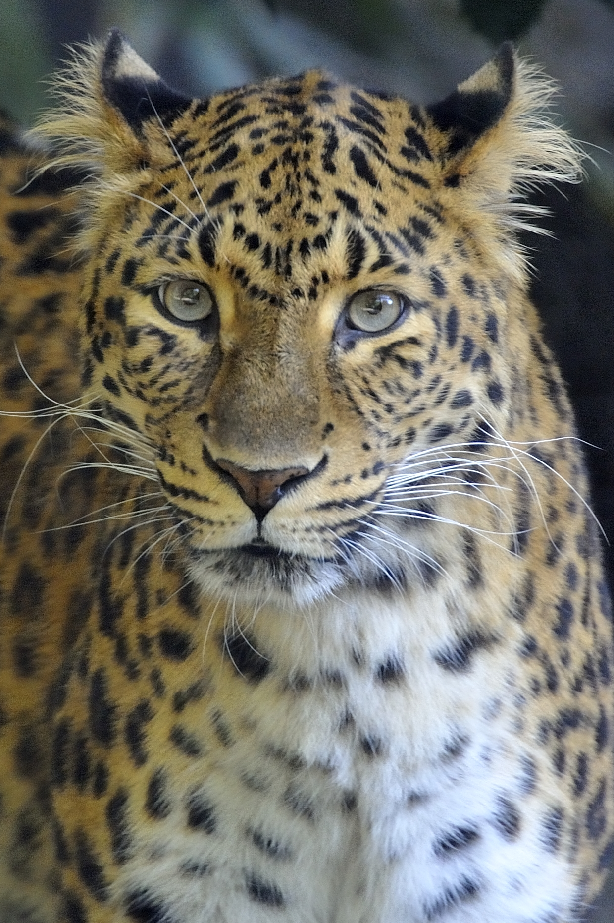 MÉNAGERIE Ménagerie du Jardin des Plantes, Paris, France.